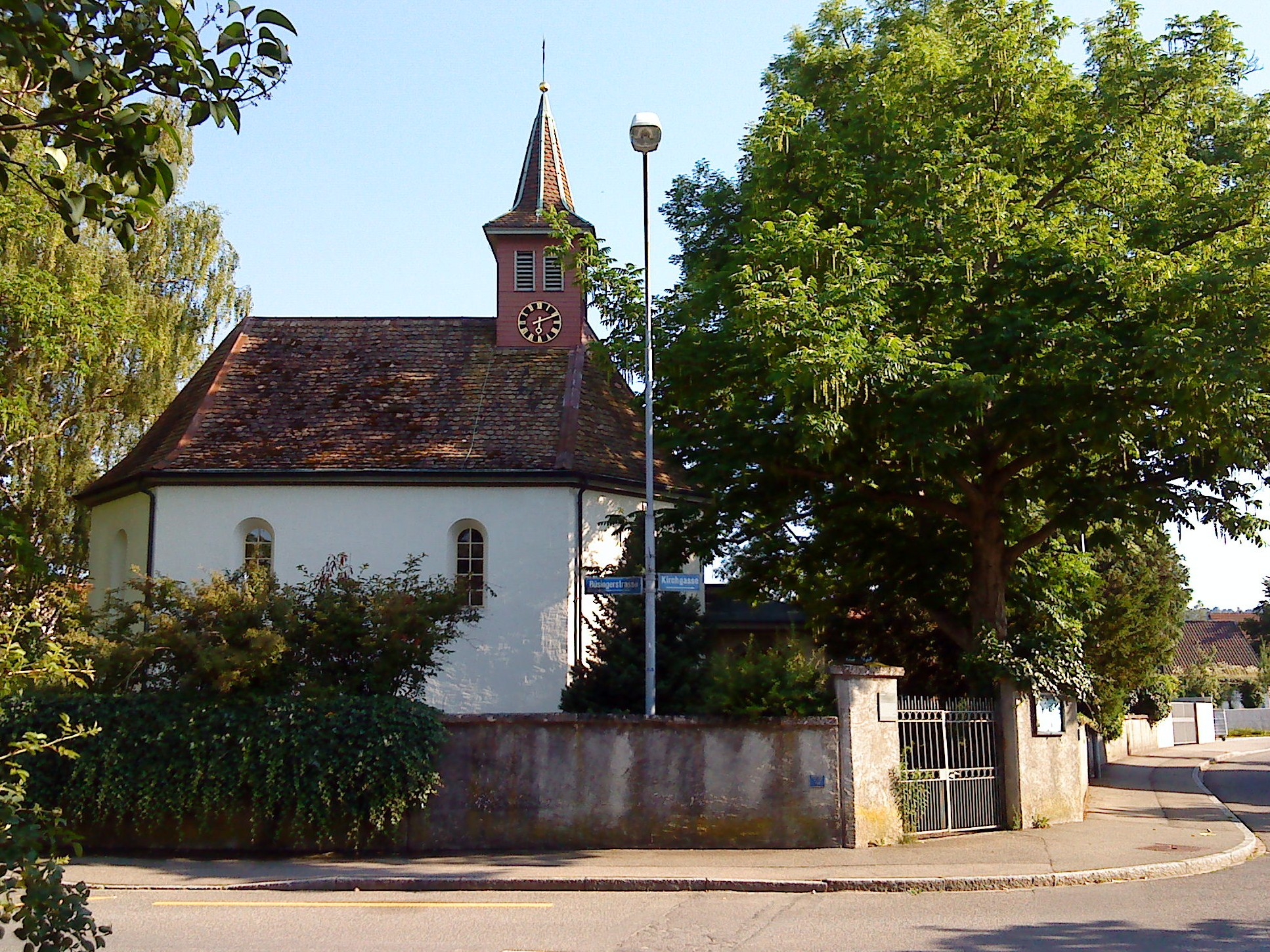 Reformierte Kirche in Buchthalen, einem Quartier von Schaffhausen.